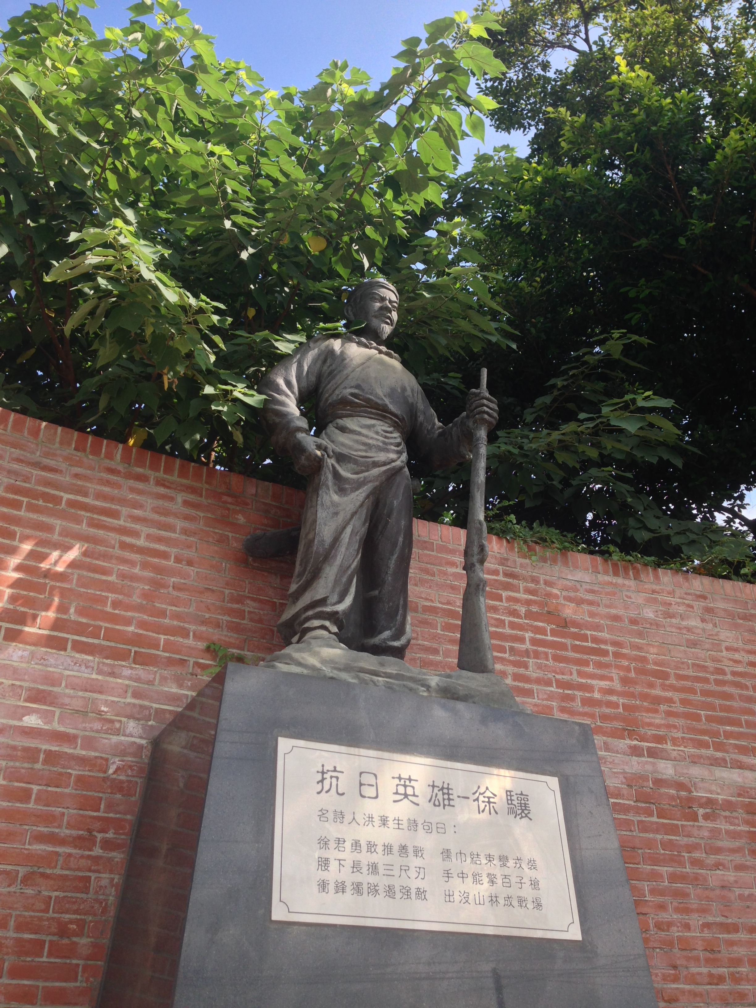 苗栗縣頭份市徐驤紀念公園徐驤銅像。